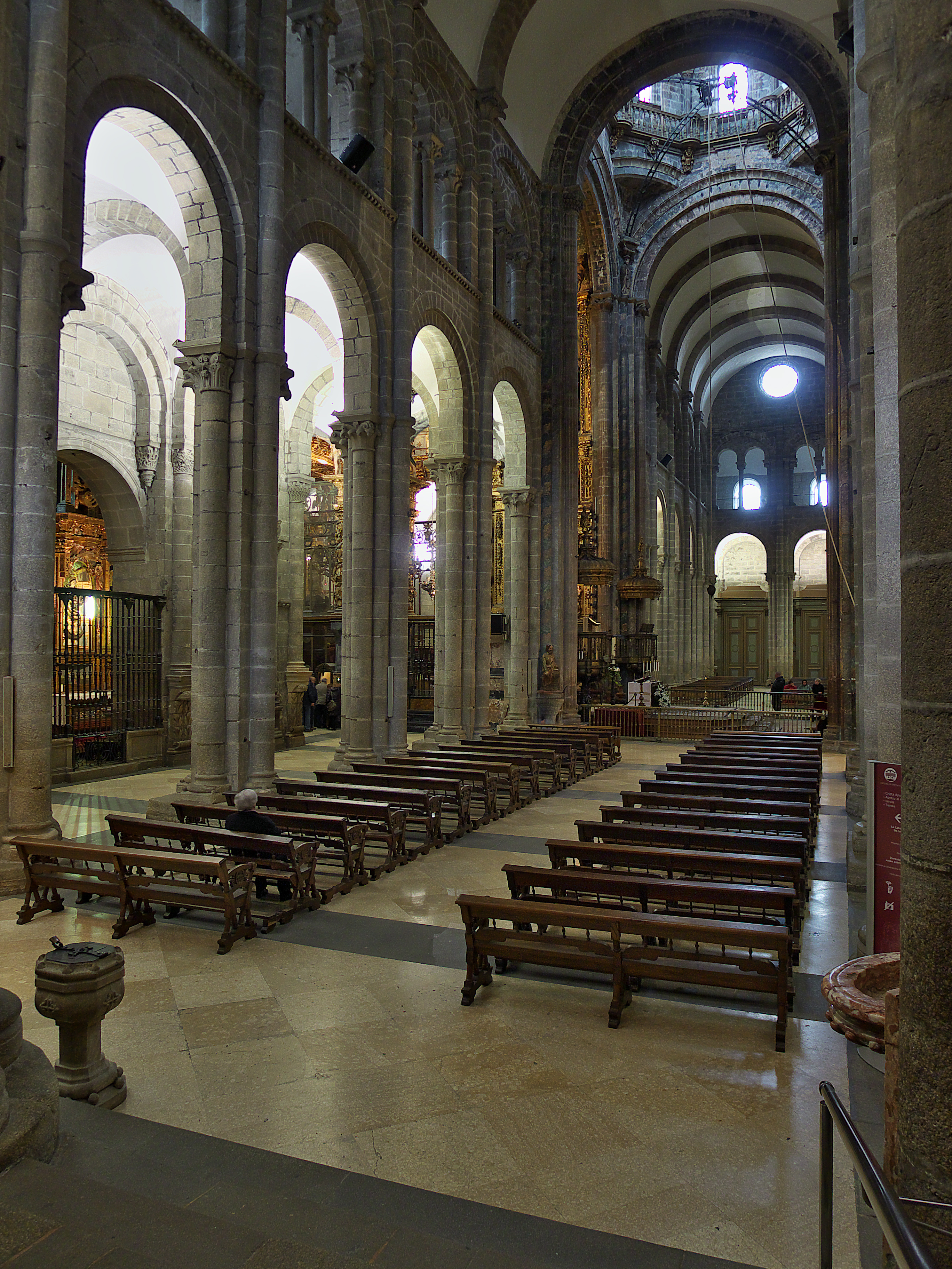 El Maestro Esteban proyecta un soberbio transepto (1100-1115) tomando como modelo el de la Abadía de Cluny